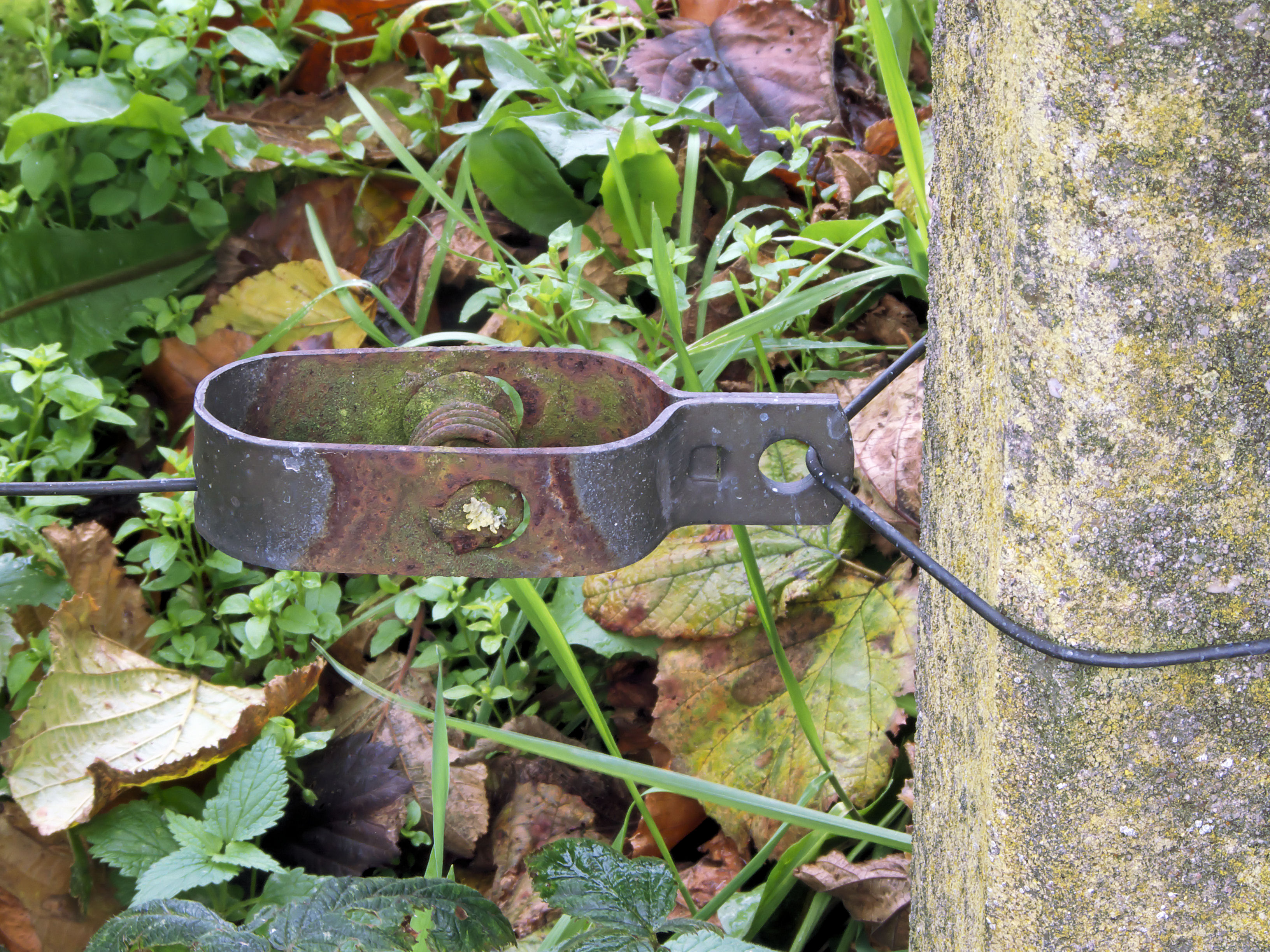 Draadspanner